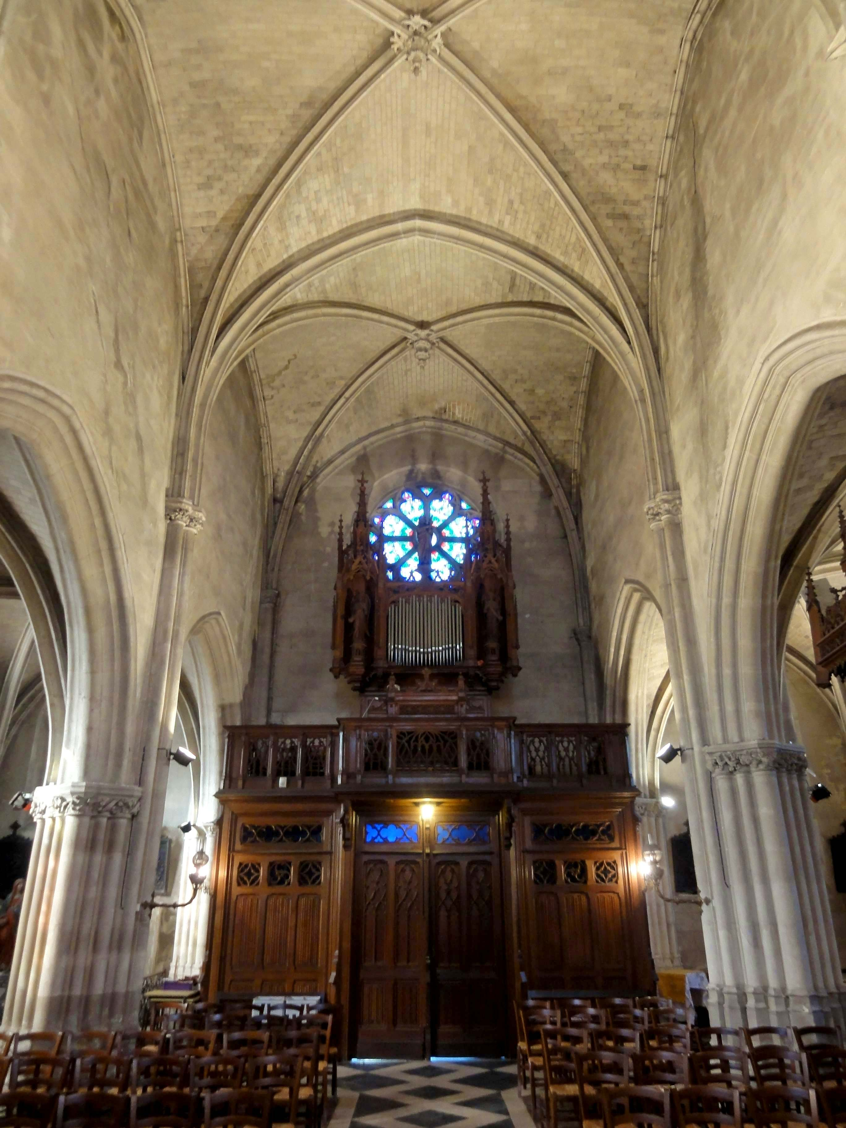 Voir titre.